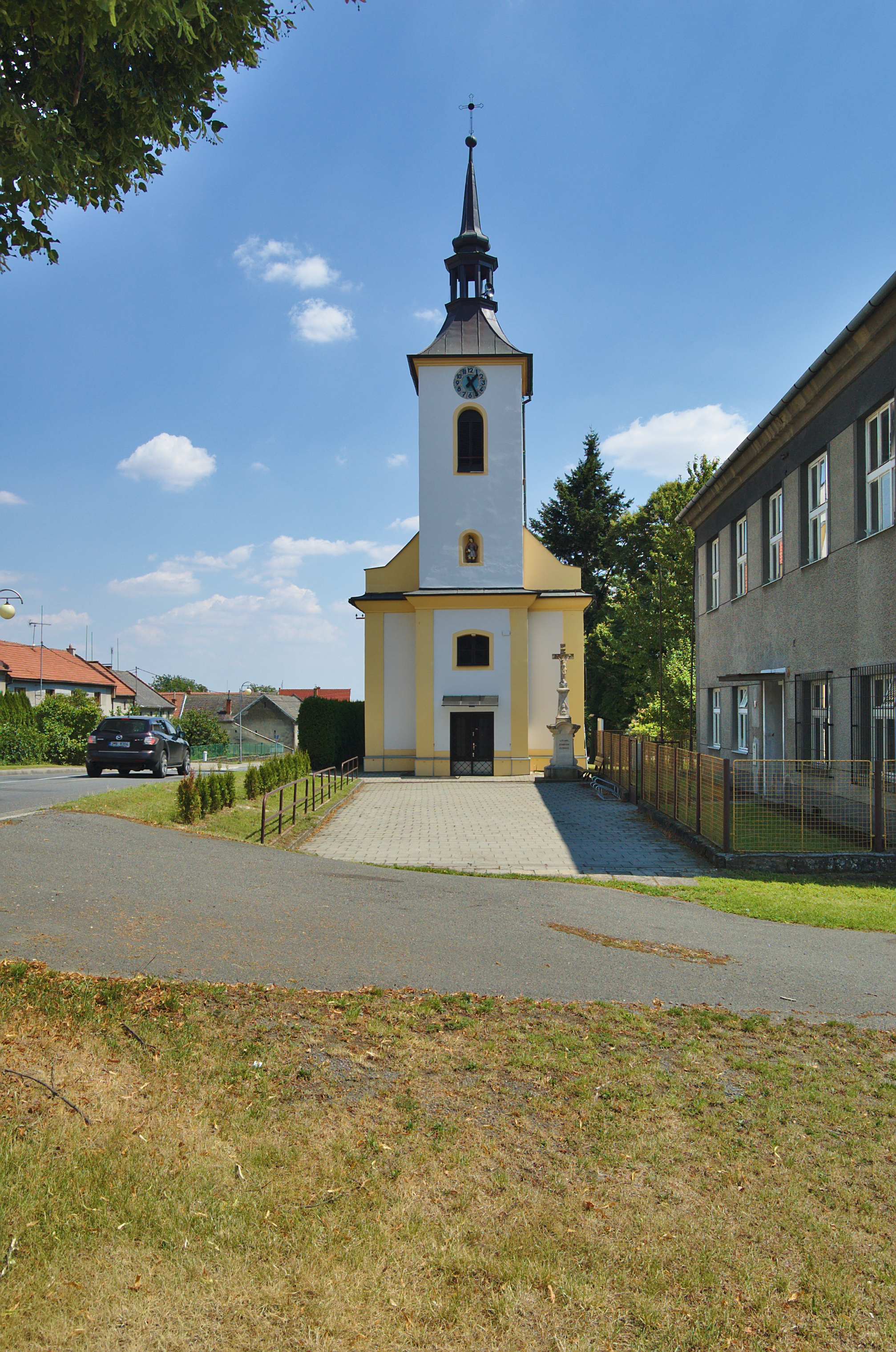 Kostel svatého Floriána - čelní pohled, Vícov, okres Prostějov